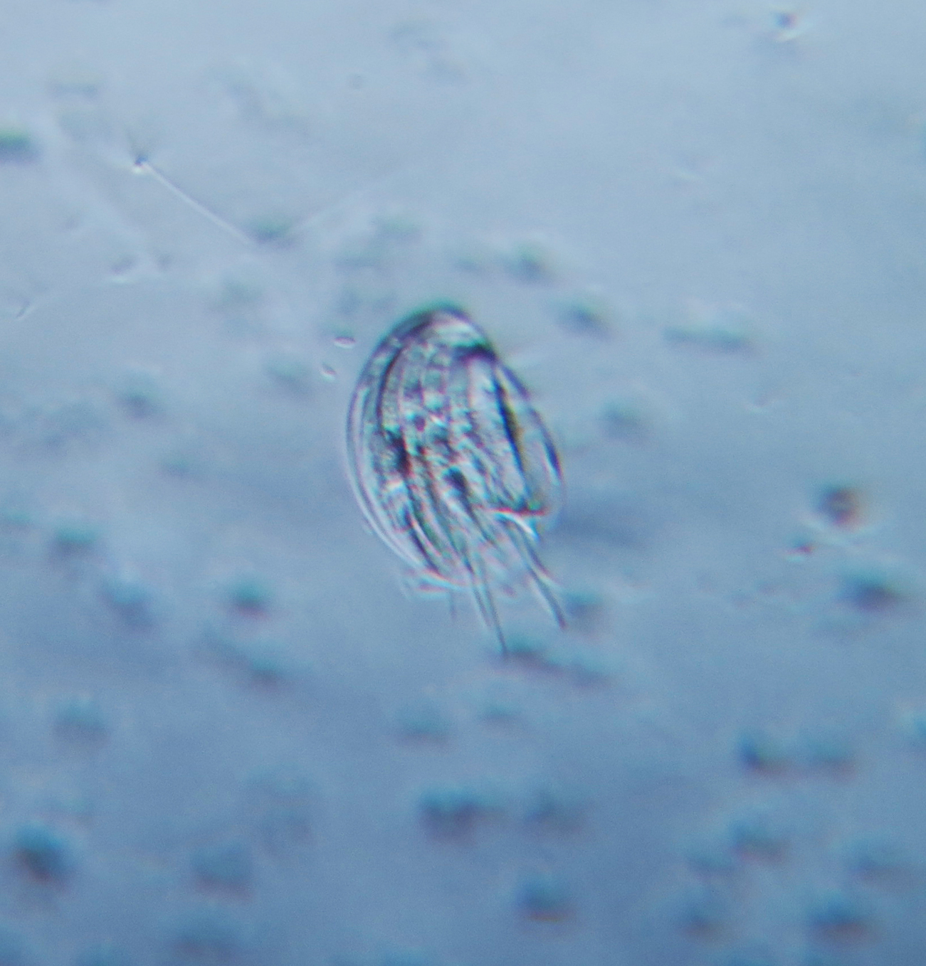 250x, schiefe Beleuchtung